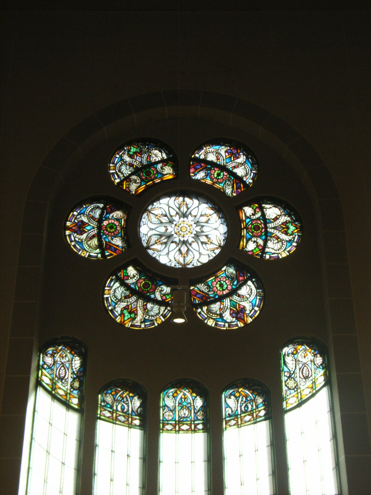 Synagoge Rykestraße in Berlin-Prenzlauer Berg (Deutschland), Rosette im Südfenster